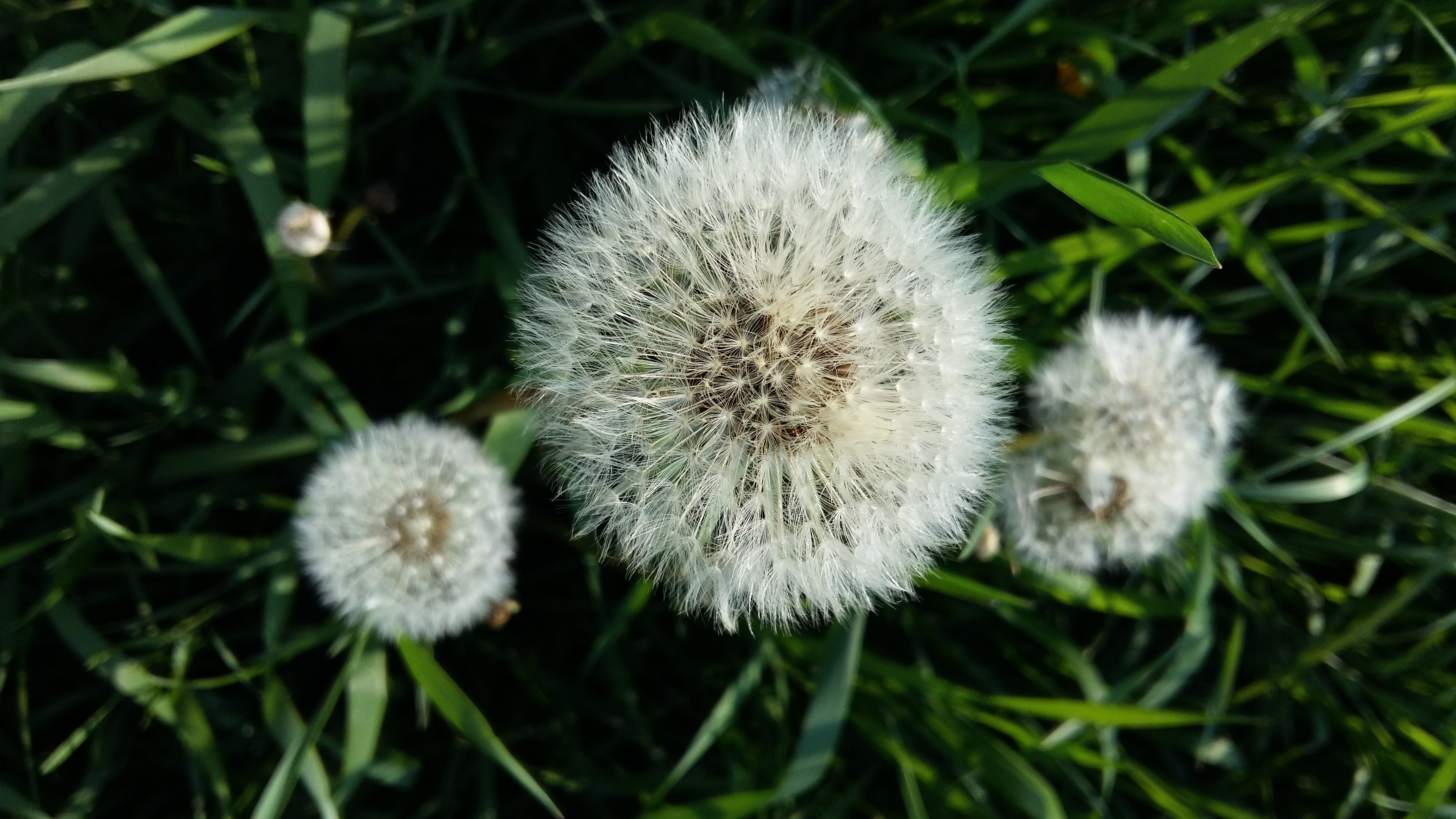 Cvijet maslačka